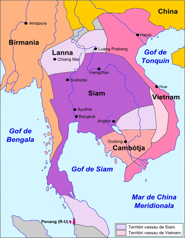 Siam dins lo corrent deis annadas 1830.